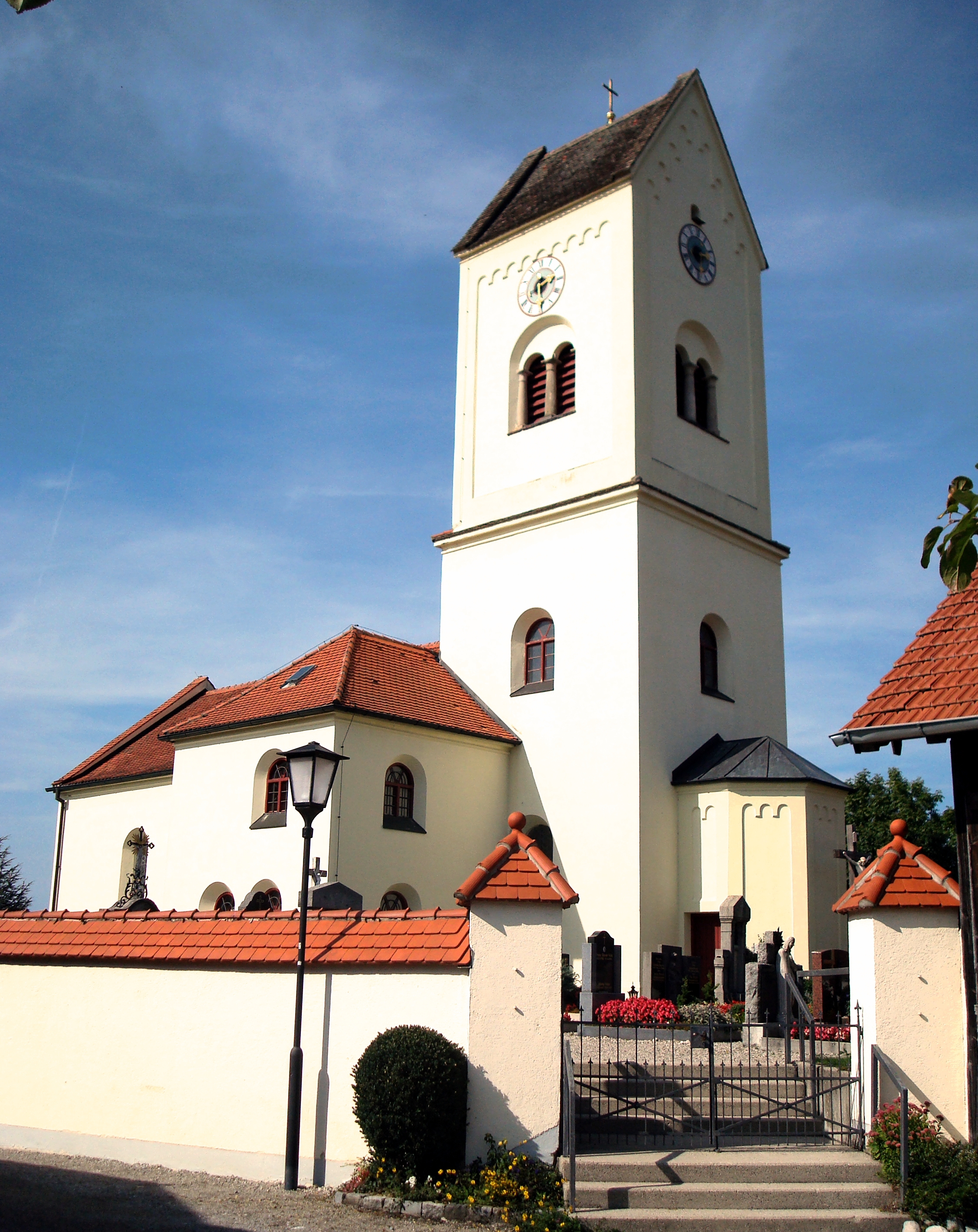 Andechs, Ortsteil Machtlfing, Kirchenweg 8. Pfarrkirche St. Johann Baptist (obere Kirche), neuromanisch, 1845/46, Turm romanisch; mit AusstattungThis is a photograph of an architectural monument.